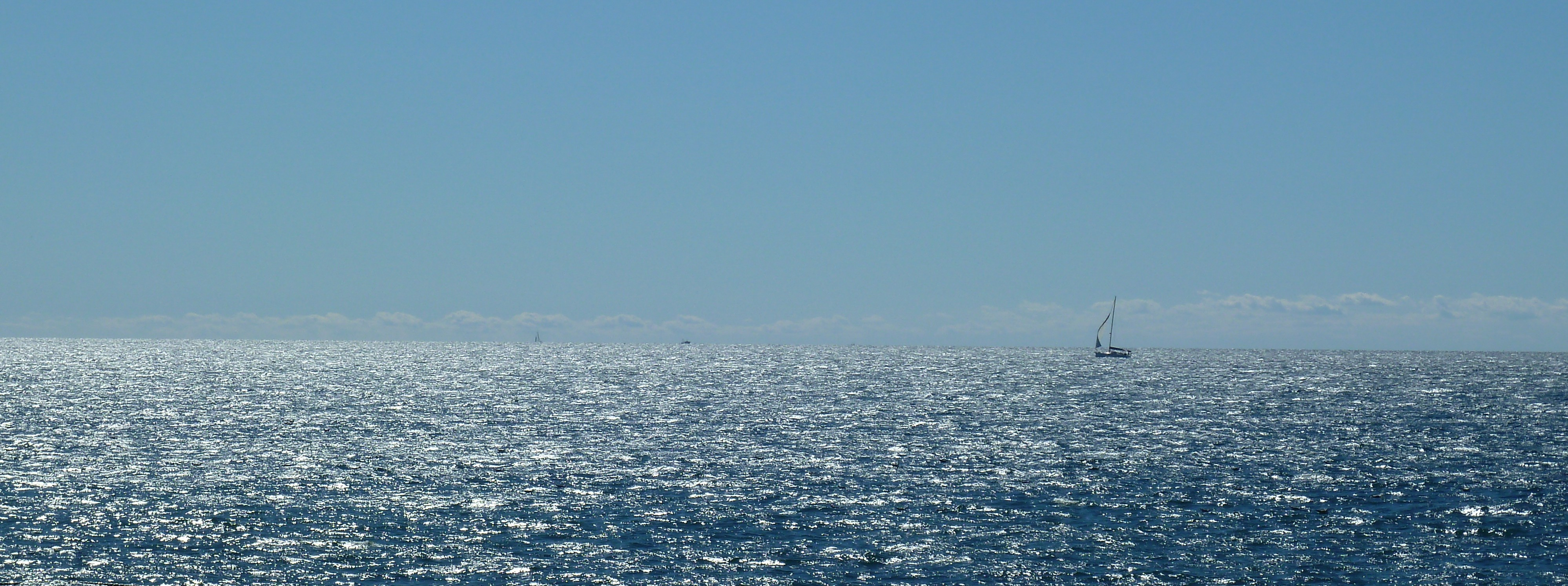 Barca a vela che naviga vicino alle coste di Parenzo, Istria, in Croazia.